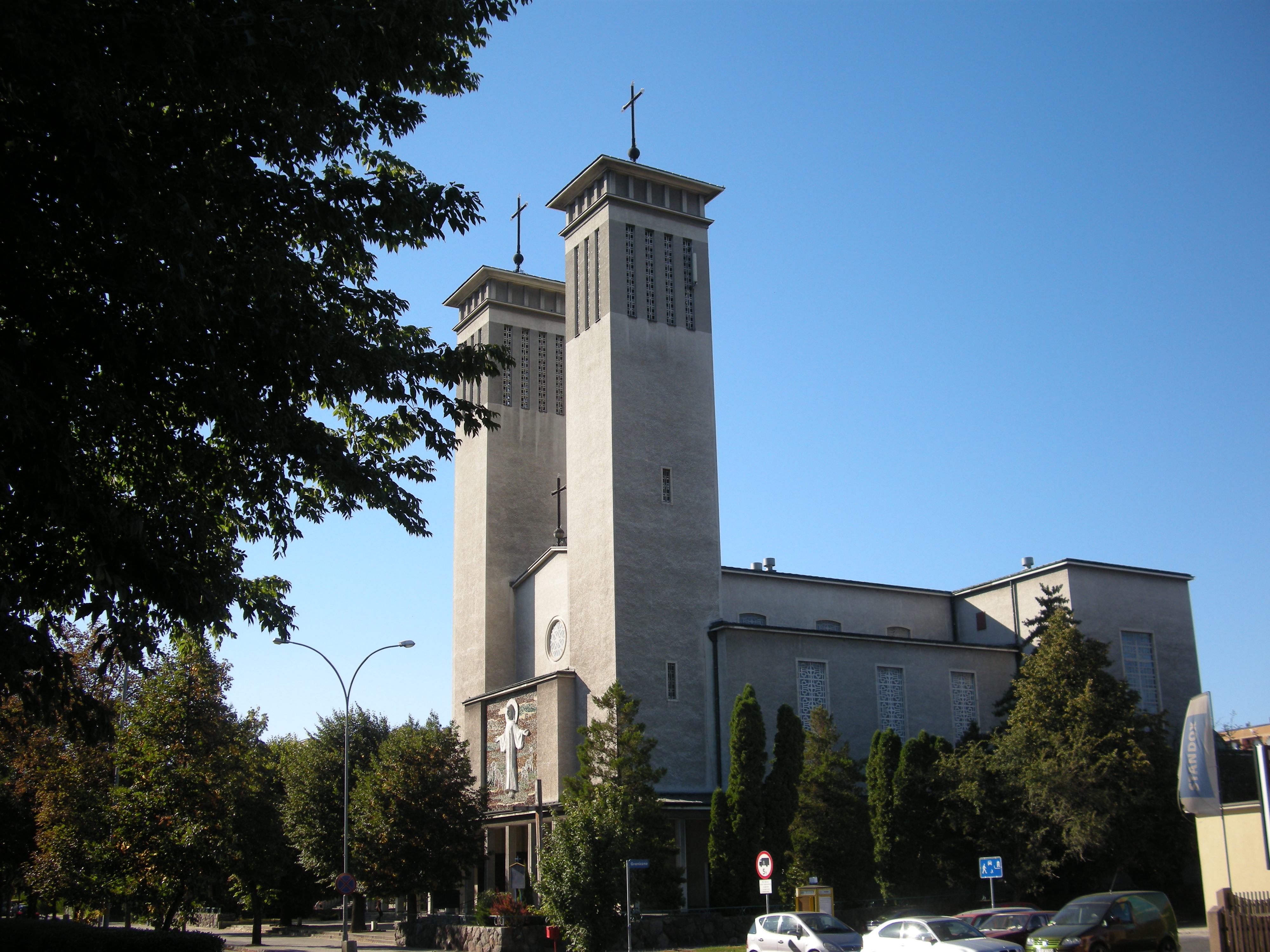 Kościół Najświętszego Serca Pana Jezusa przy ul. Lwowskiej